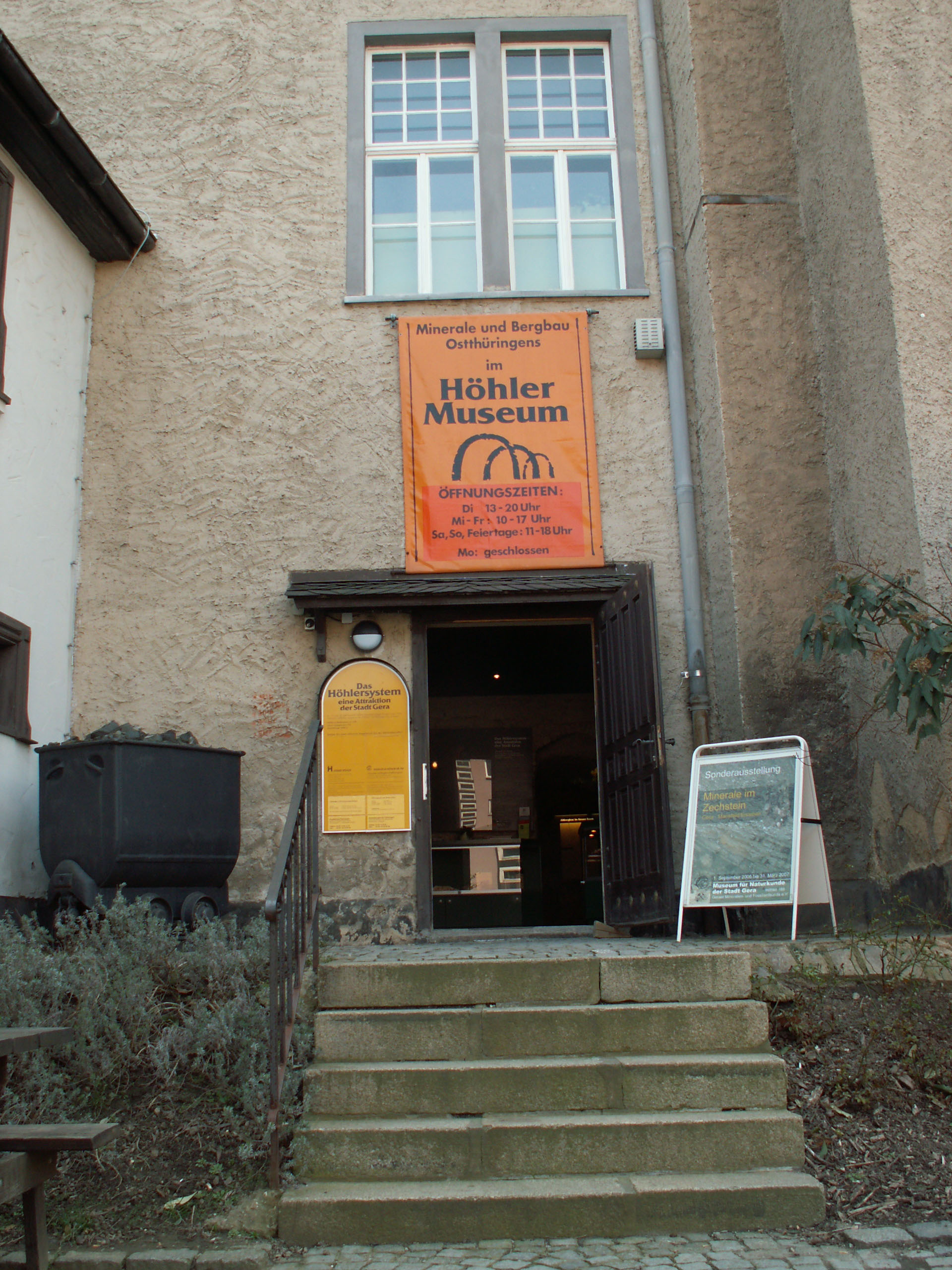 Aufgenommen auf einer Wanderung vom Hofwiesenpark in Gera zur neuen Landschaft Ronneburg. Hierbei handelt es sich um die beiden Teile des Bundesgartenschaugeländes, die mehr als 10 km voneinander entfernt liegen. Näheres zur Route findet sich auf der Webseite Wandern vom Hofwiesenpark Gera zur neuen Landschaft Ronneburg .